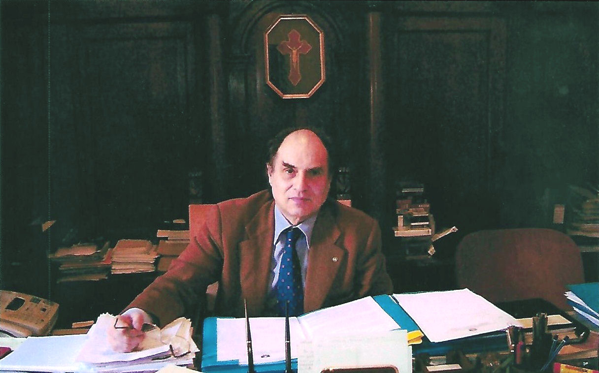 Lionello Cammarota